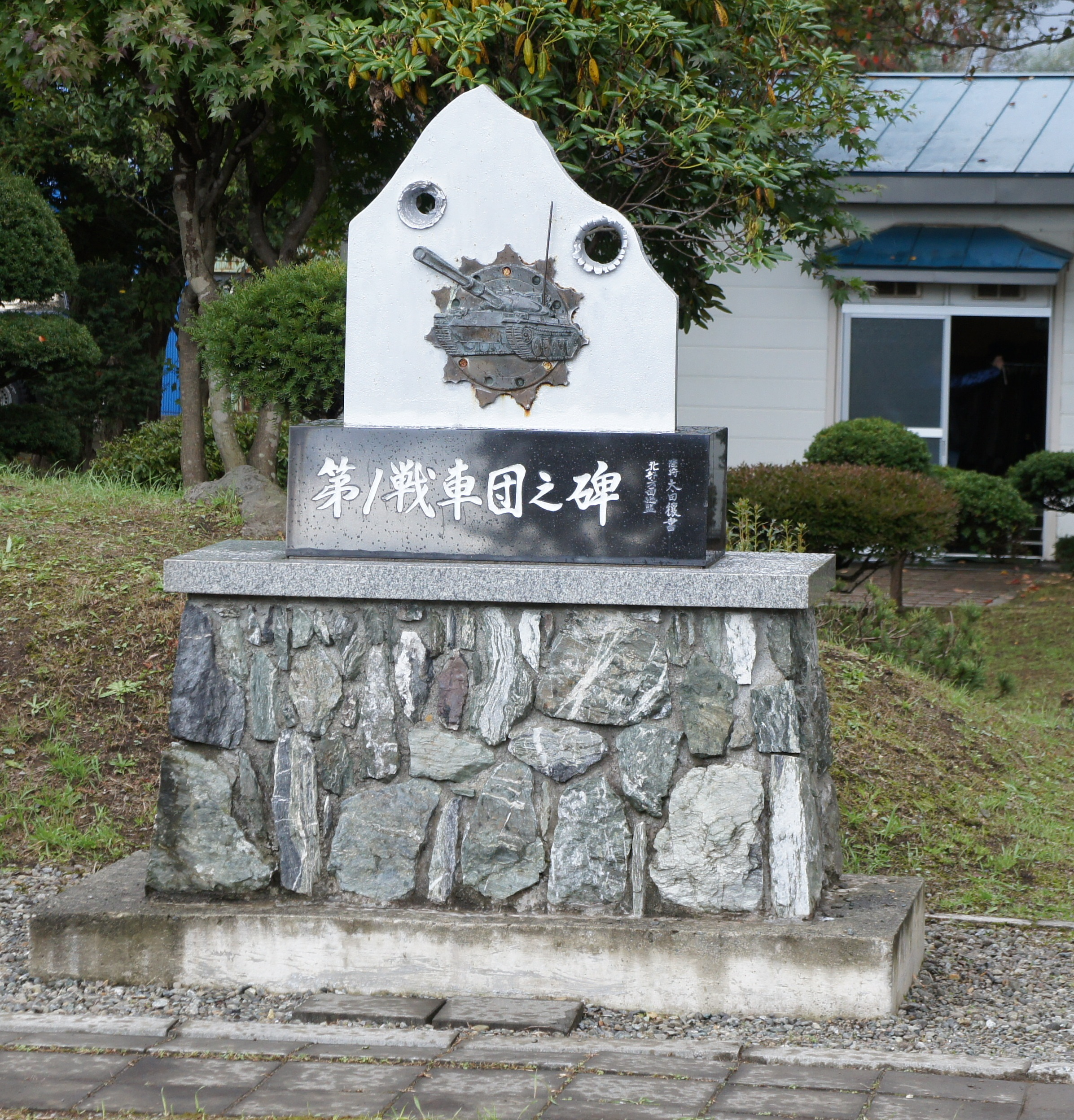 廃止された第1戦車団の記念碑です。